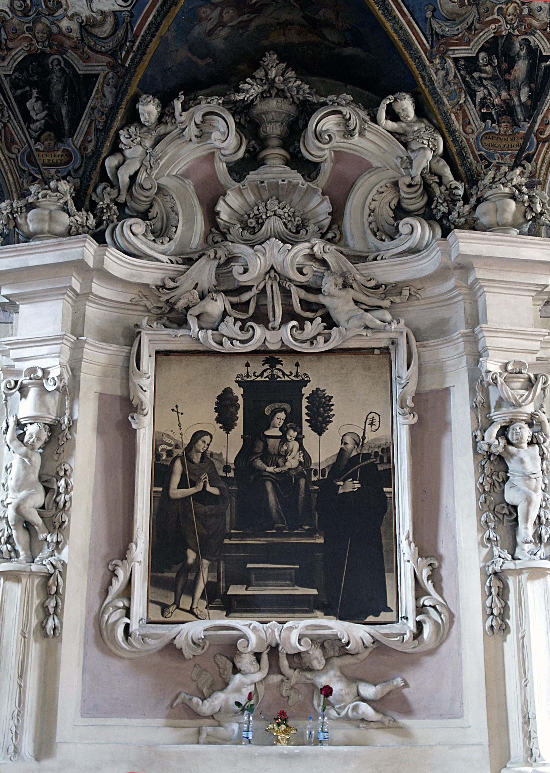 Riproduzione fotografica del 1863 situata nella parete dell’ex altare in sostituzione della pala di Eusebio da San Giorgio, allievo del Perugino, l’originale è nella Galleria Nazionale dell’Umbria. La pala raffigura la Madonna in trono con Bambino tra i santi Giovanni Battista e il titolare Benedetto. La presenza di S. G. Battista si spiega perchè è il santo anacoreta, precursore di ogni monaco cristiano che ha scelto l’isolamento dal mondo. Ai lati due alberi di cedro, invece dei due angeli richiesti dai committenti, ma più “moderni” per l’epoca rinascimentale. La pala aveva una coeva cornice in legno, opera dell’intagliatore Giovanni Battista di Cecco, sostituita poi dalla cornice in stucco. Foto di Fausto Castraberte per il Servizio Turistico Comune di Perugia. This is a photo of a monument which is part of cultural heritage of Italy.